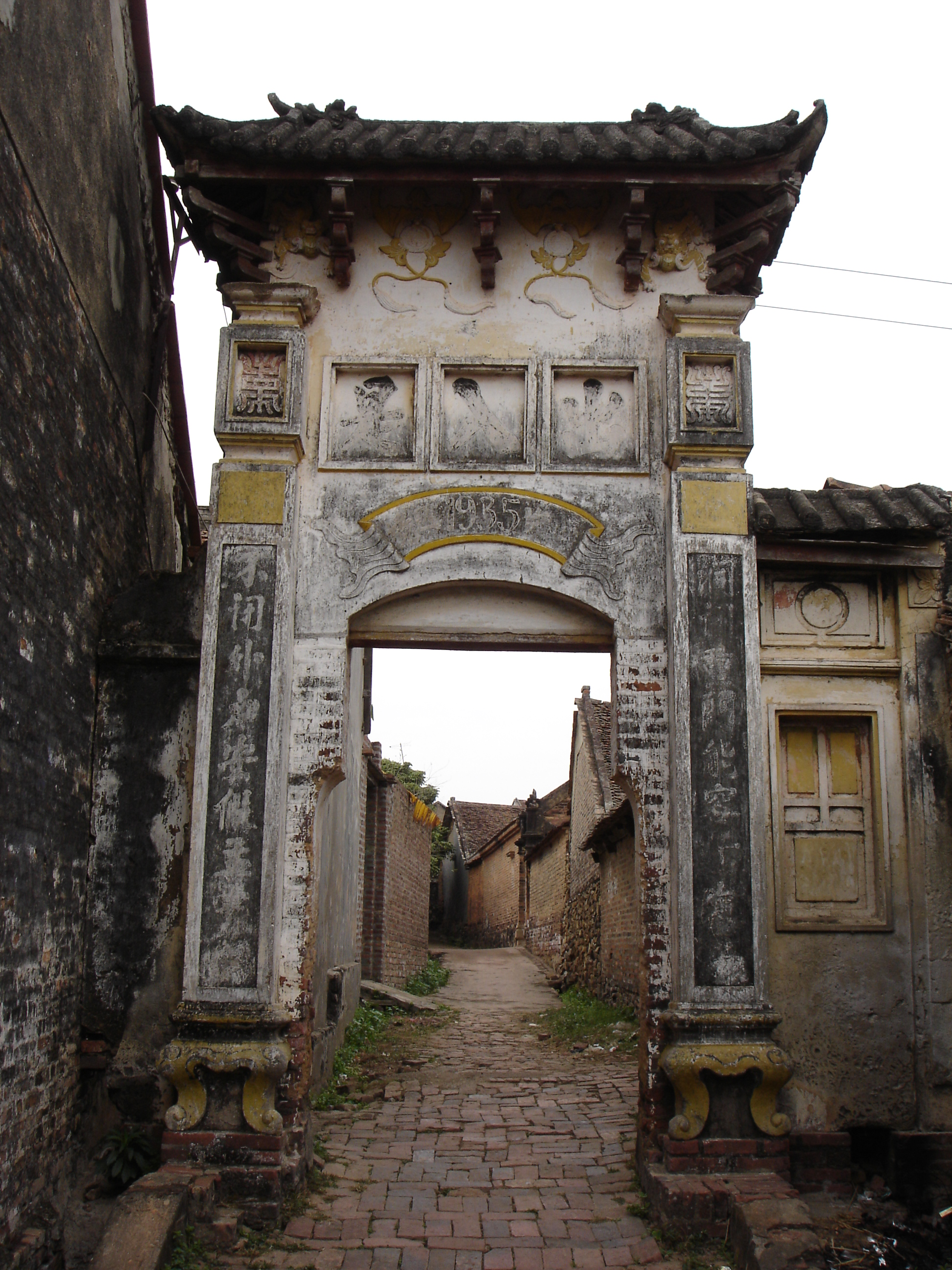 Cổng làng cổ kính đã được xây dựng cách nay đã gần 100 năm